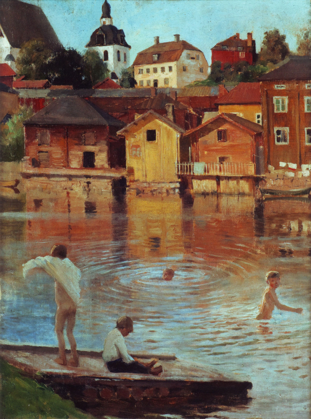 Boys Swimming in the Porvoo River / Porvoonjoessa Uivia Poikia